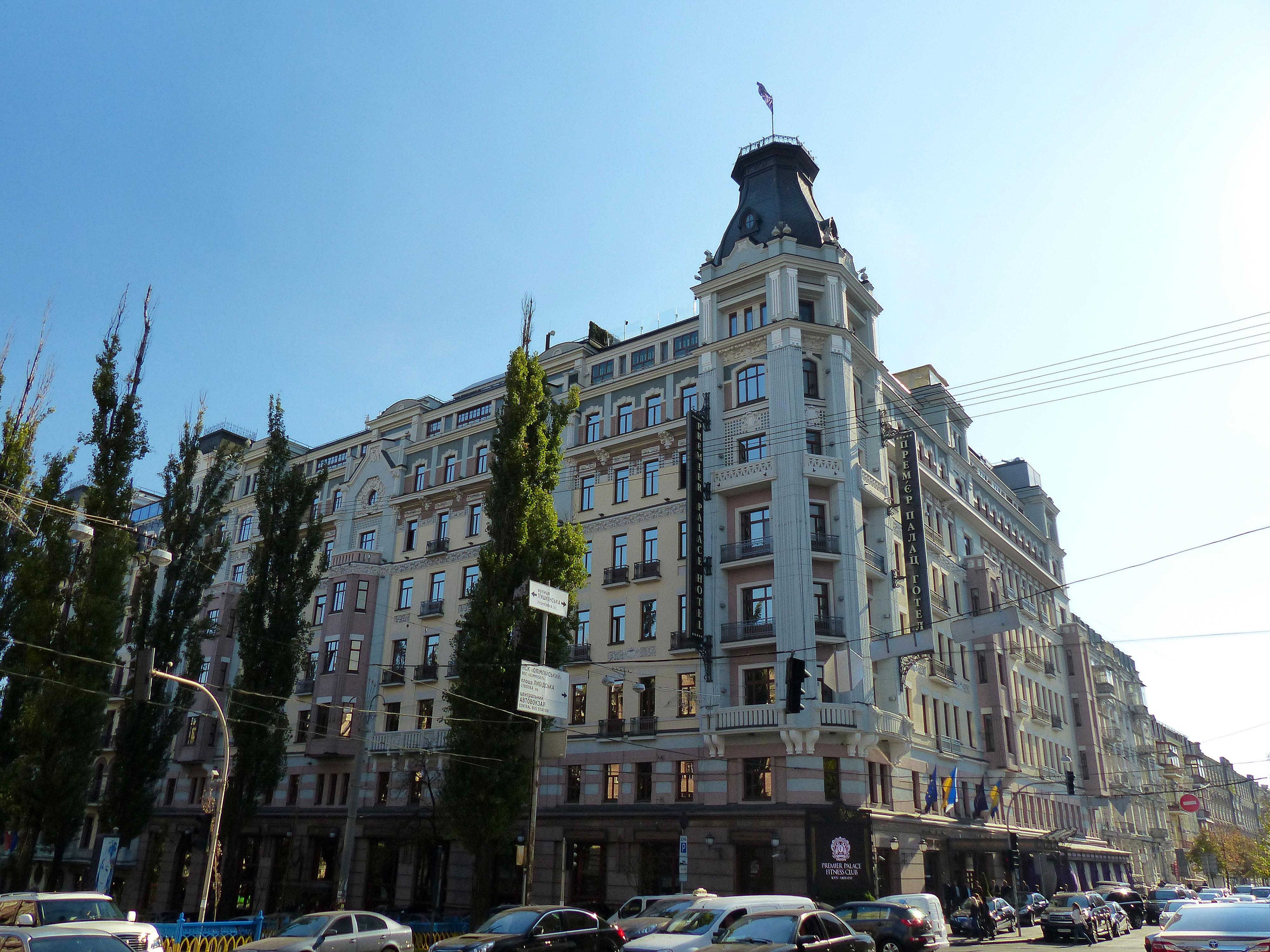 Готель «Палас», в якому у квітні-червні 1919 р. розташовувався Всеукраїнський комітет охорони пам'яток мистецтв та старовини (ВУКОПМІС), Київ, Шевченка Тараса бульв., 7/29